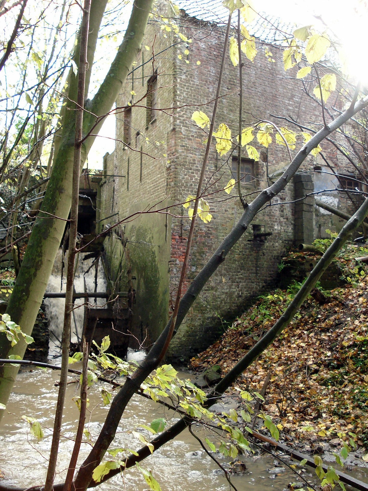 Sint-Lievens-Houtem, Oost-Vlaanderen. Korenwatermolen op de Molenbeek, 19e eeuw.